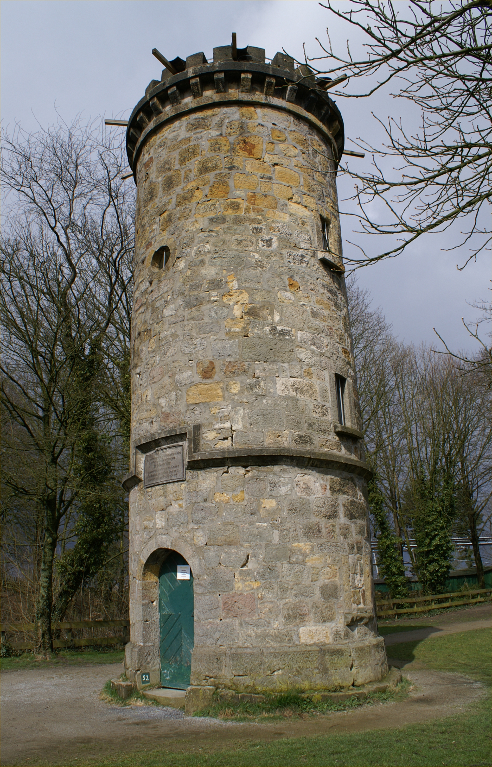 Der Wierturm auf der Burganlage in Tecklenburg, Nordrhein-Westfalen This is a photograph of an architectural monument.